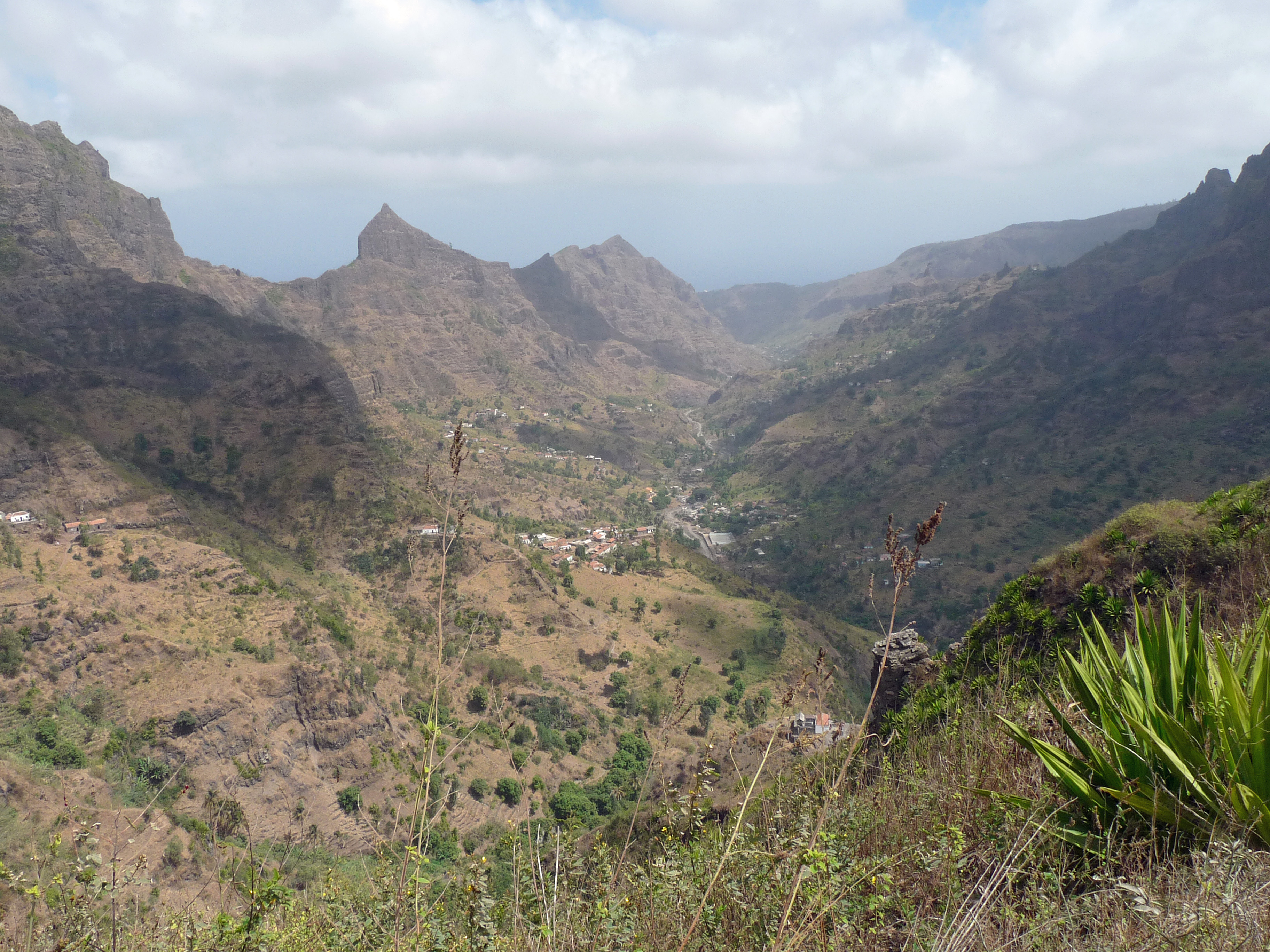 Ribeira Principal (île de Santiago, Cap-Vert)